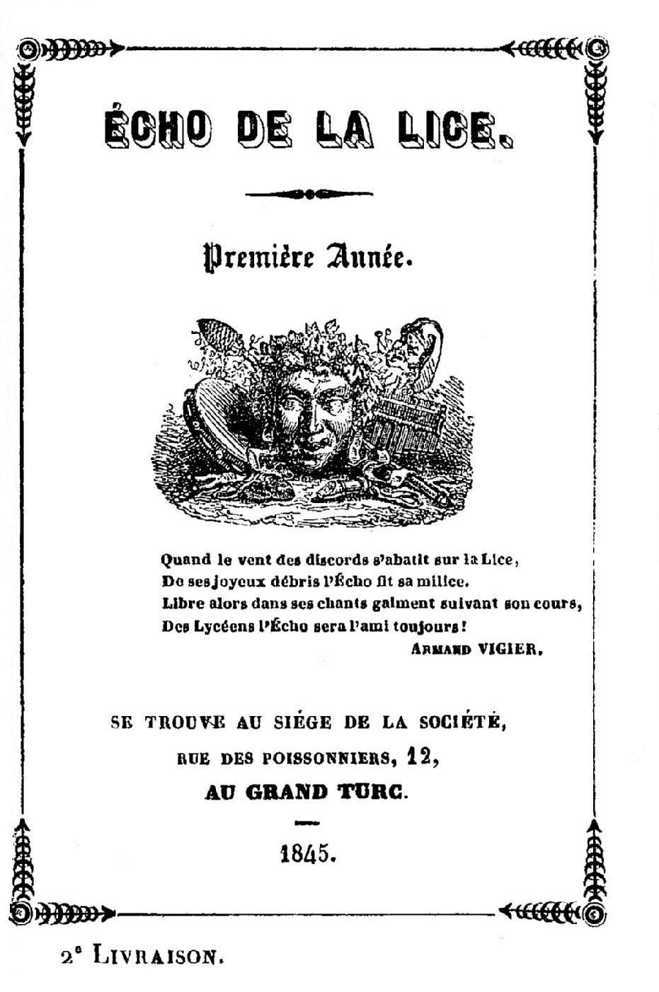 Couverture de la 2ème livraison, première année de L’Écho de la Lice, organe de la goguette parisienne de La Lice chansonnière.